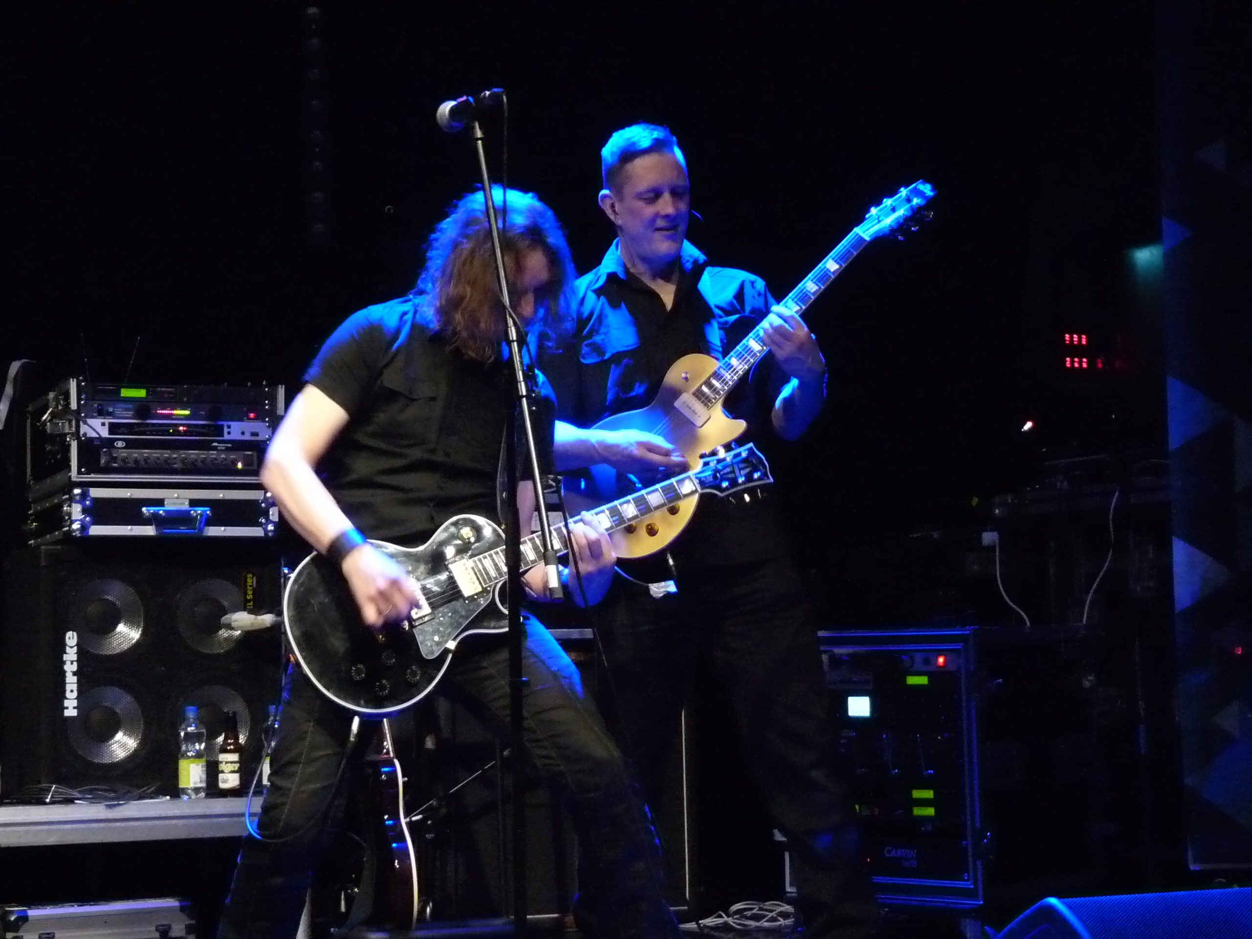 Cirrha Niva, Live